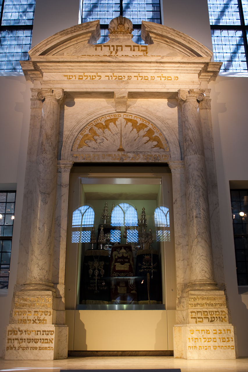 De Ark The Ark in the Great Synagogue in the Jewish Historical Museum in Amsterdam A characteristic feature of the Great Synagogue is the imposing marble Ark presented to the community in 1671 by Abraham ben Isaac Auerbach of Coesfeld. At the top of the Ark, surmounted by the Crown of Torah, are various Hebrew texts. The inscriptions at the base of the columns flanking the doors of the Ark, state the benefactor’s name and date in Hebrew: (5)431 (=1671), and the dates of two restorations in 1855 and 1913. keywords: michelelovesart wlanl